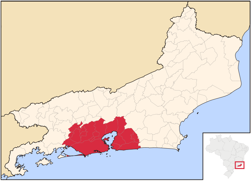 Vista dos municípios constituintes da Região Metropolitana do Rio de Janeiro.